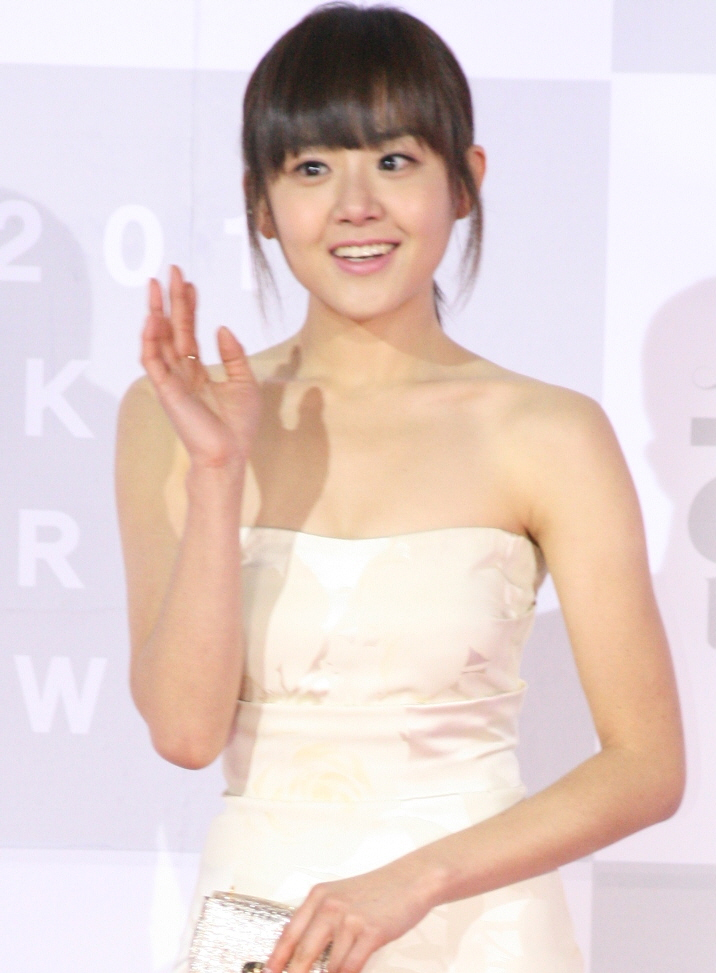 2010KBS연기대상 501